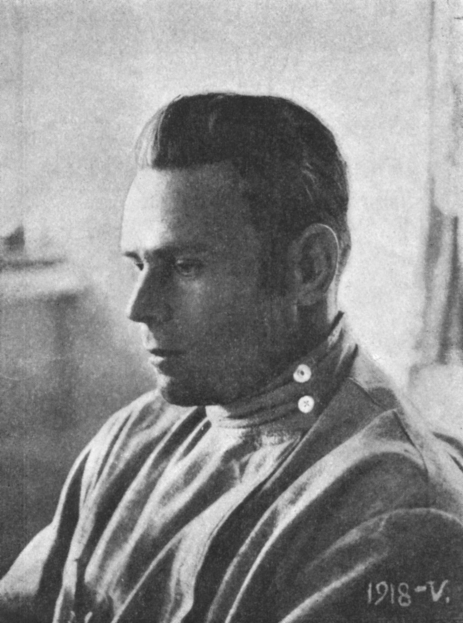 Заливчий Андрій Іванович (1892–1918), український політичний діяч та письменник.